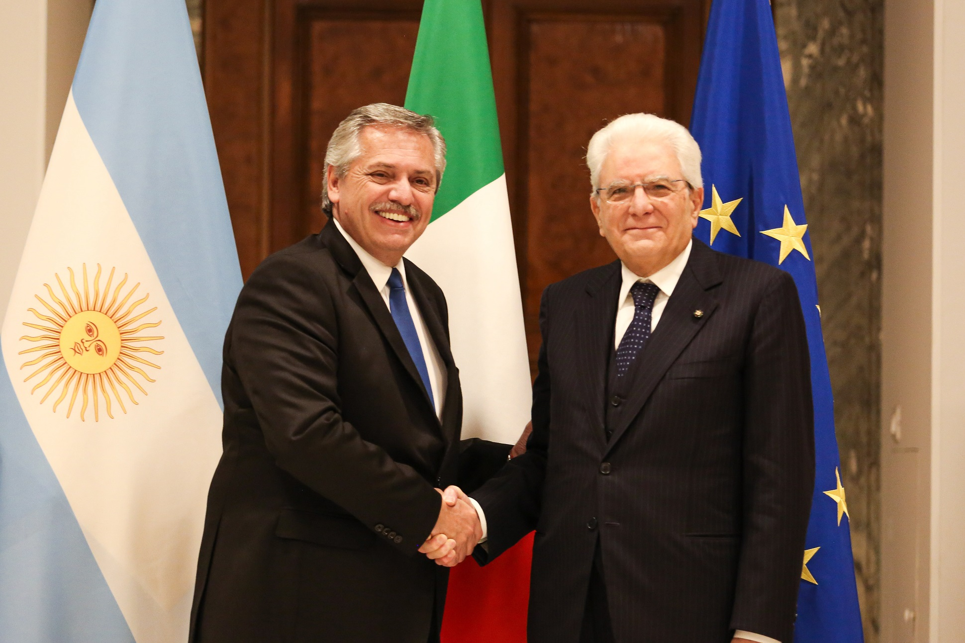 El presidente Alberto Fernández mantuvo una audiencia con el presidente de Italia, Sergio Mattarella, en el Palacio del Quirinale de Roma.